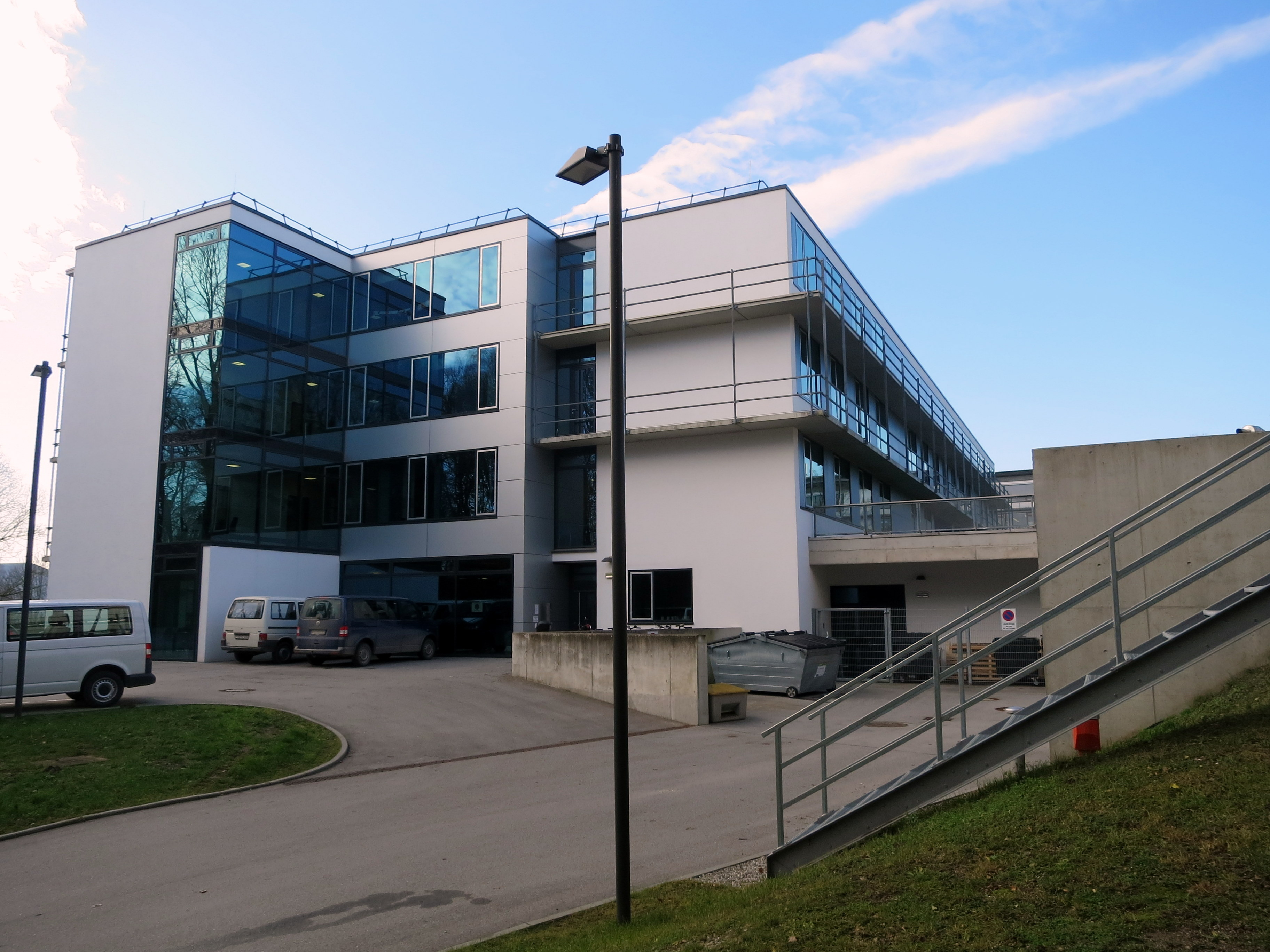 Das Hans-Eisenmann-Zentrum ist ein Gebäude für Zusammenarbeit in den Agrarwissenschaften